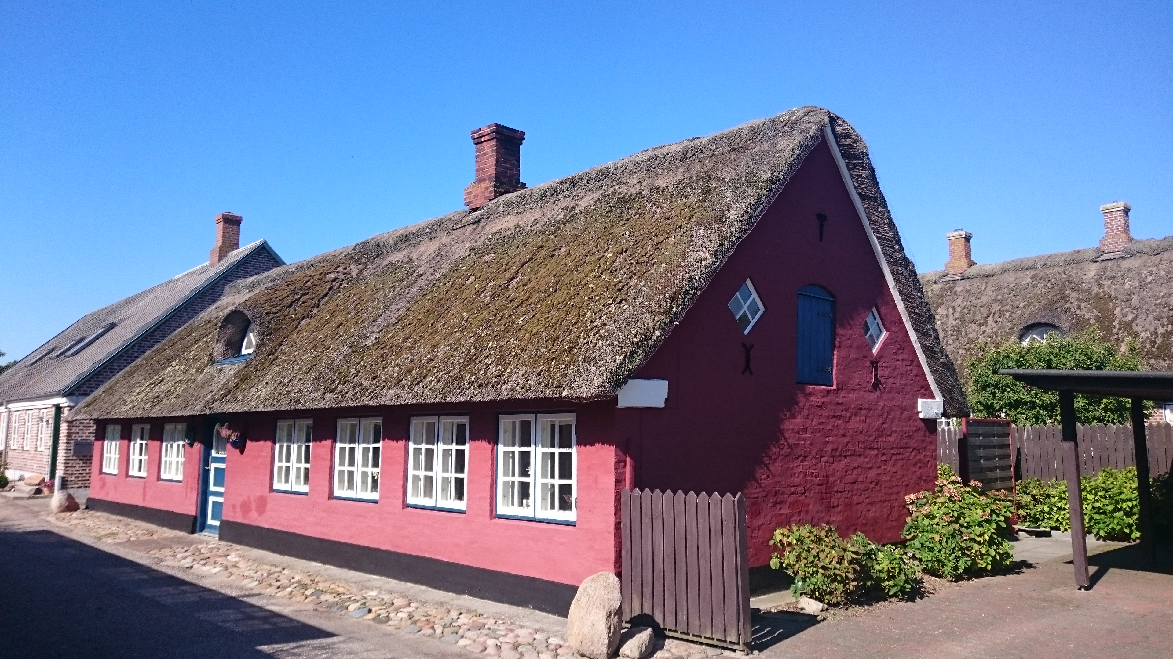 Martin Christensensvej 1